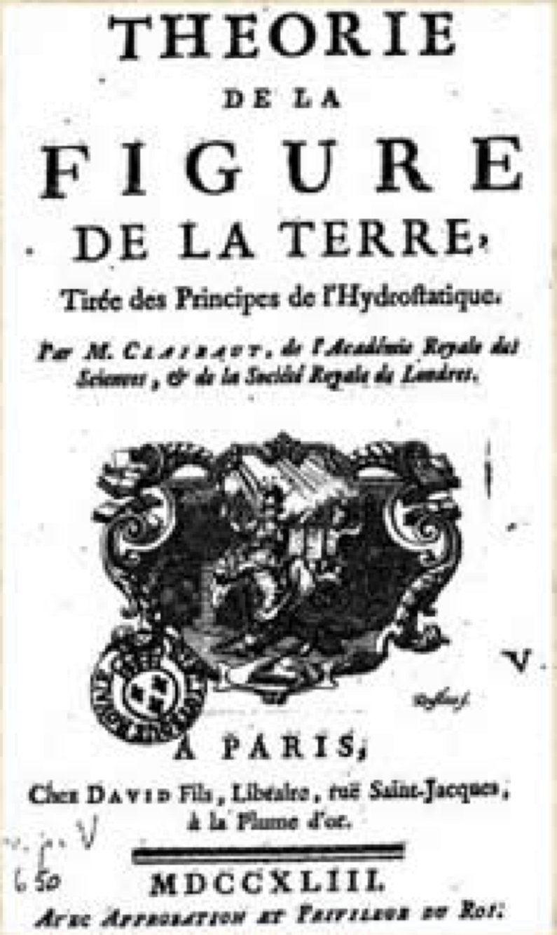 Page de titre de la première édition, datant de 1743, de l'ouvrage Théorie de la Figure de la Terre, Tirée des Principes de l'Hydrostatique d'Alexis Claude Clairaut (1713–1765). Eu égard au fait que l'ouvrage date de plus de deux siècles et demi, et que son auteur est mort en 1765, cette figure se trouve dans le domaine public. Carlo denis 19 juillet 2006 à 22:40 (CEST)